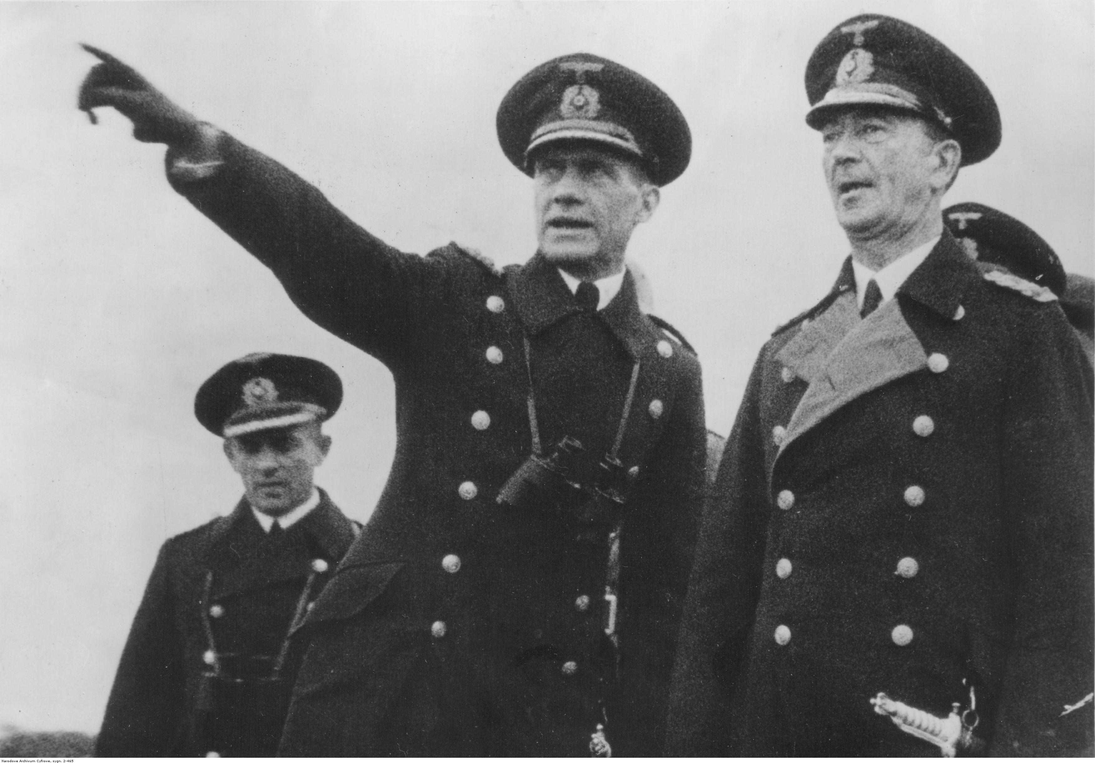 Admirał Hermann Boehm (1 z prawej) w towarzystwie komendanta odcinka ogląda umocnienia obronne w Norwegii.